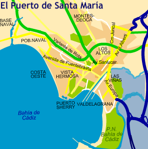 Plano de la Ciudad de El Puerto en Cádiz